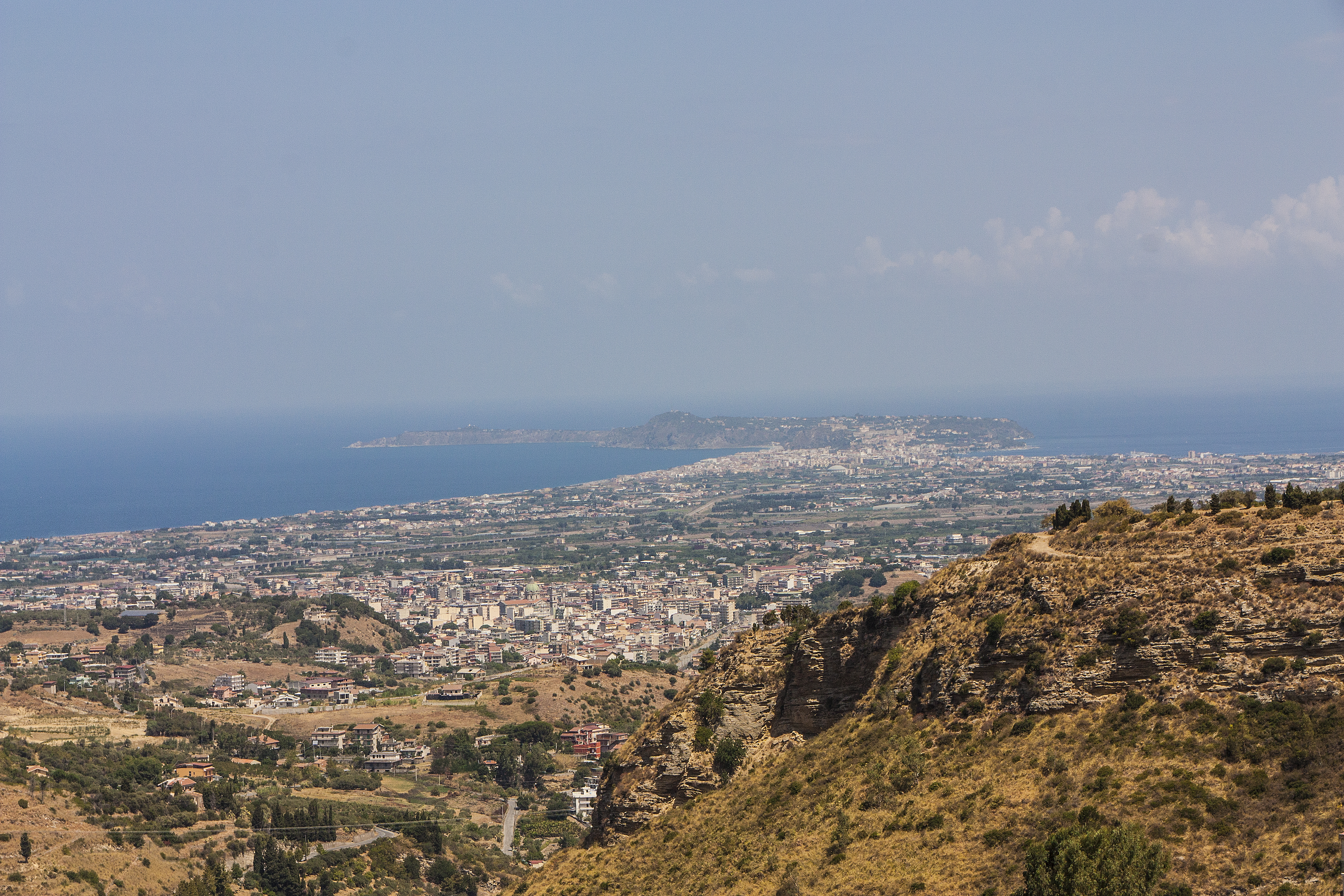 Capo Milazzo da Castroreale